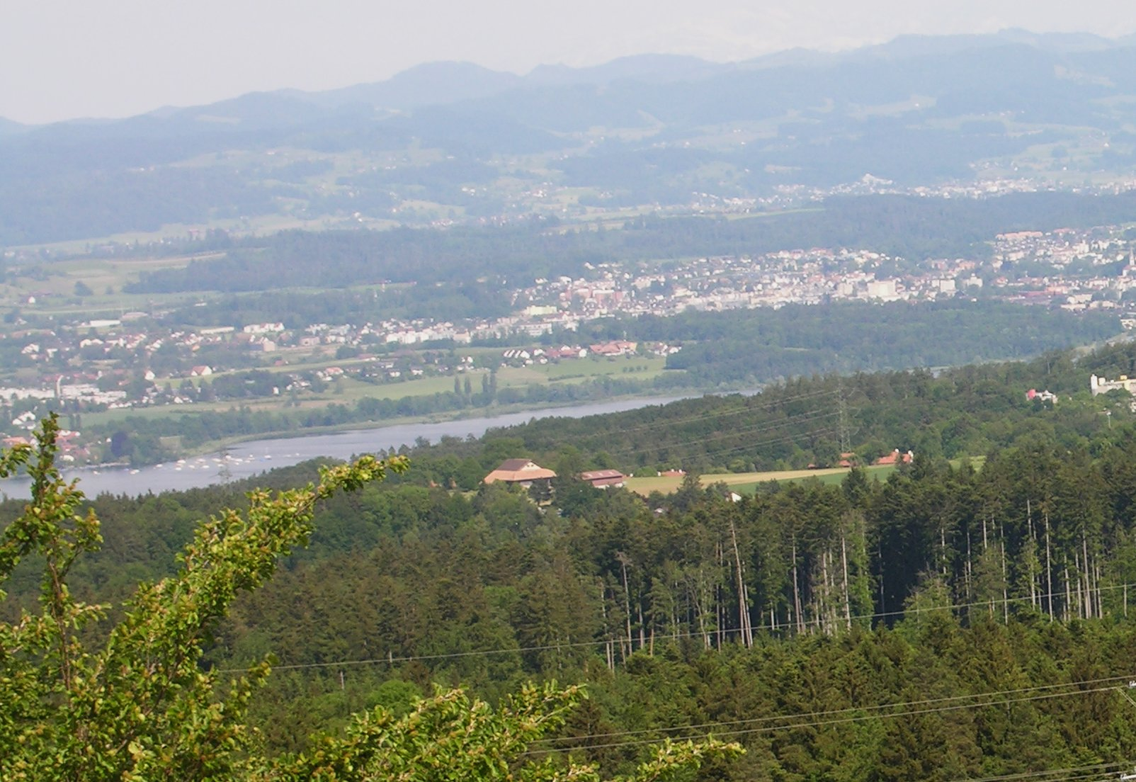 Greifensee lake, Switzerland